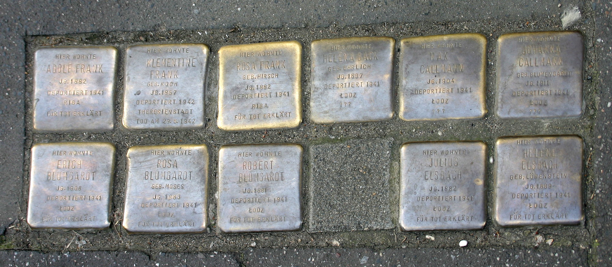 Stolpersteine von Gunter Demnig in der Eichendorffstraße 43 in Köln